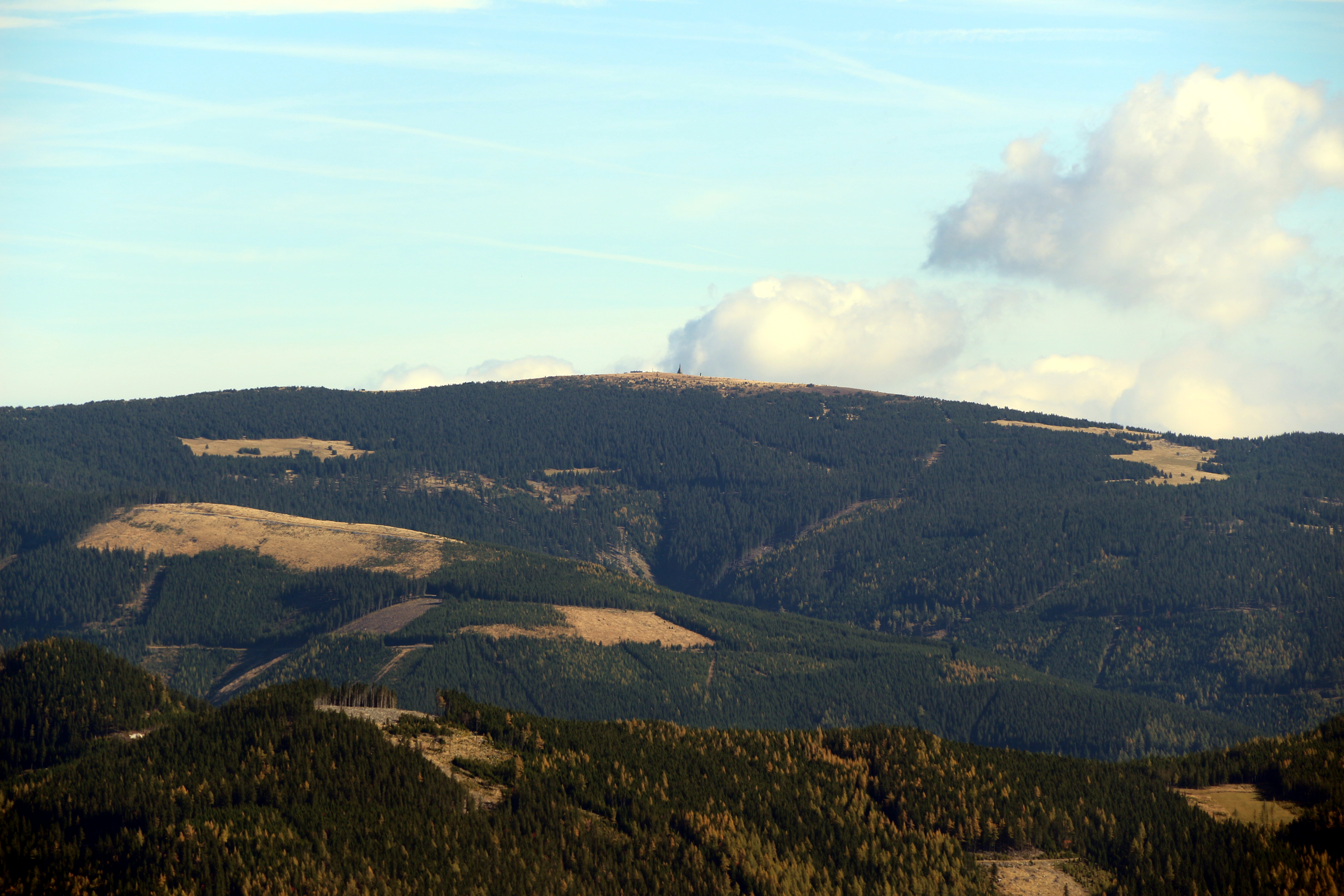 Hochwechsel von der Pretul aus gesehen (Blickrichtung Osten).